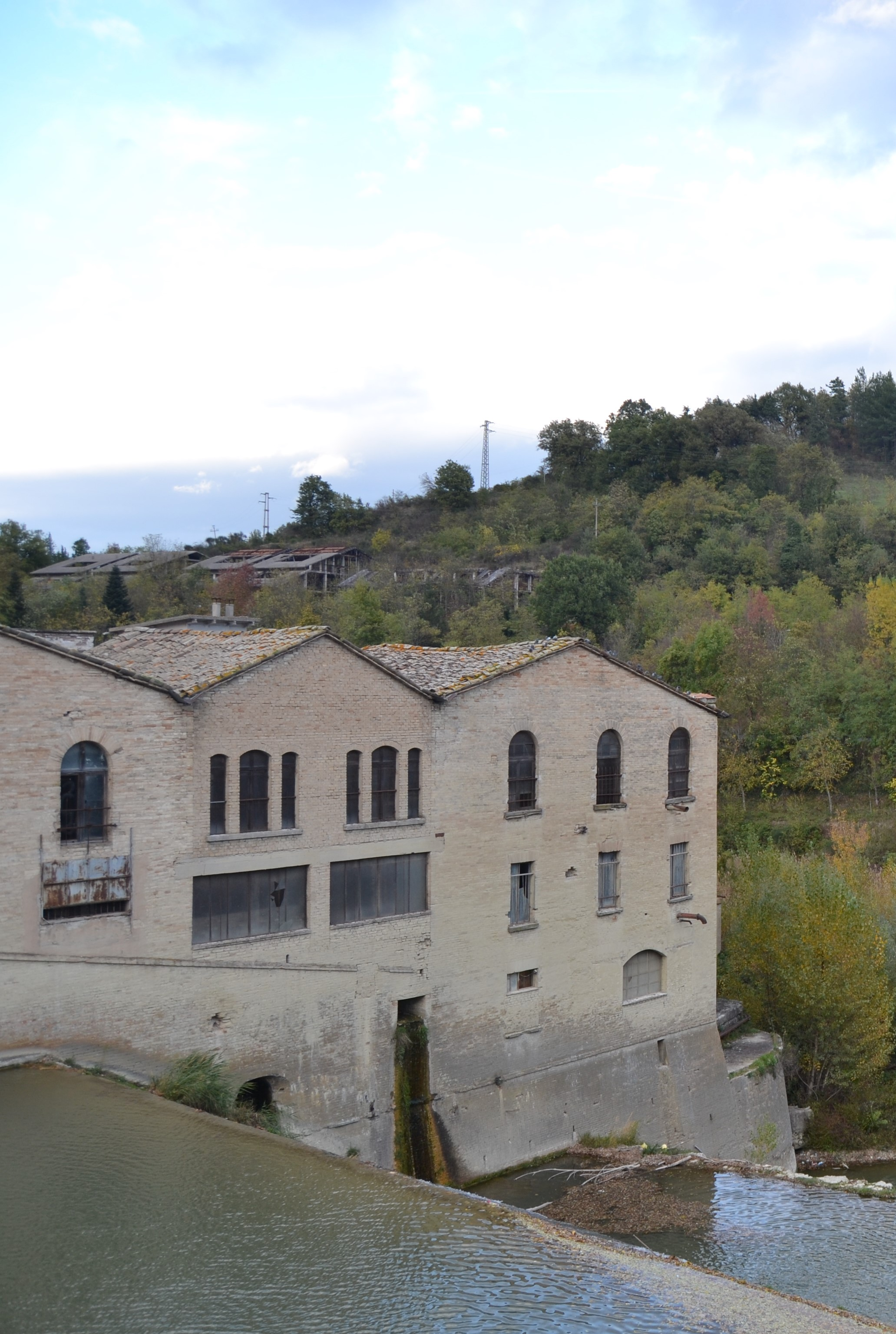 L'ancienne papeterie